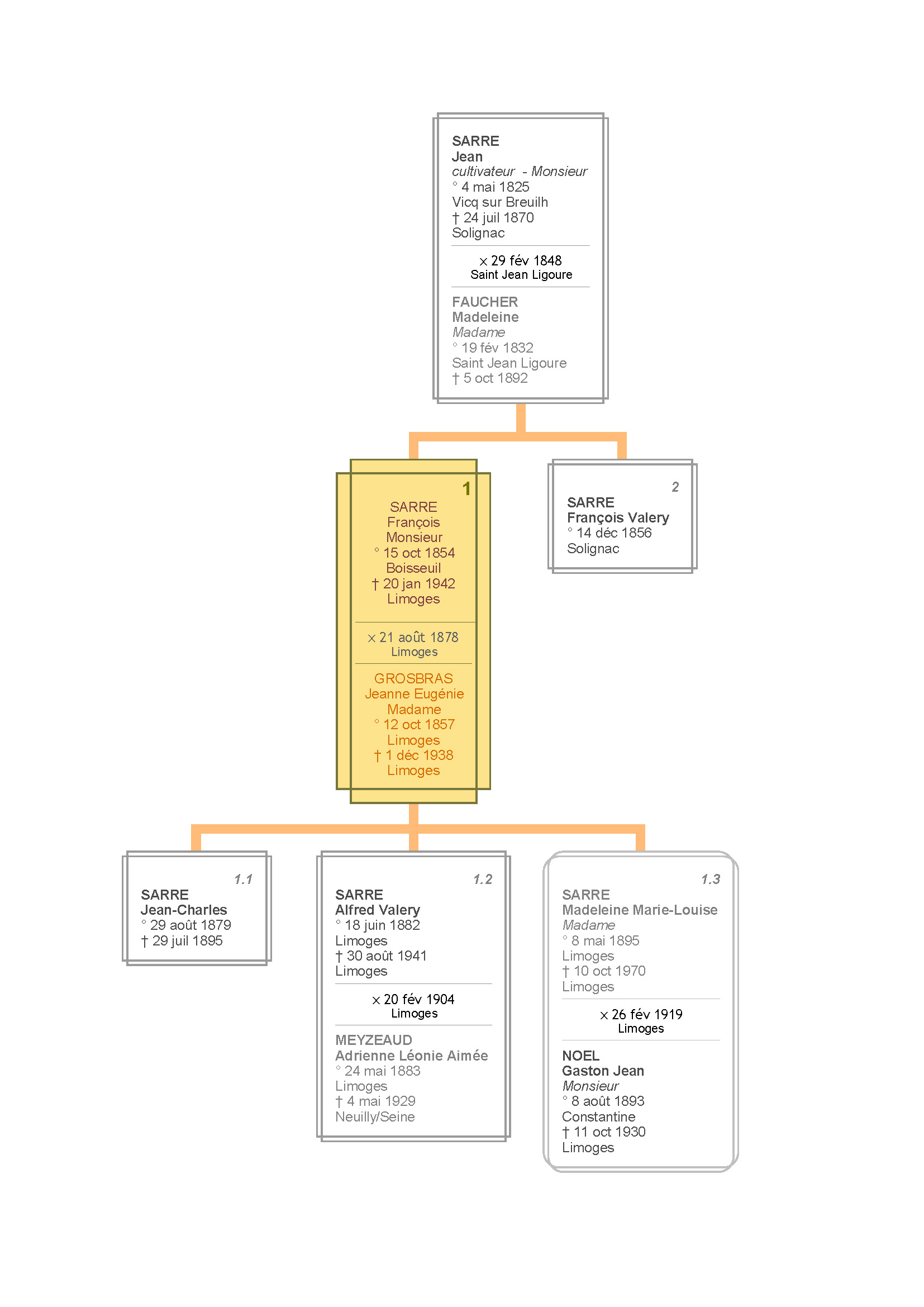 Arbre généalogique de François Sarre